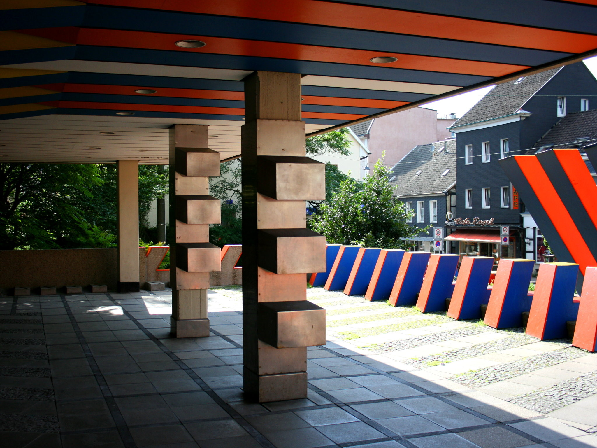 Kreishaus des Ennepe-Ruhr-Kreises in Schwelm